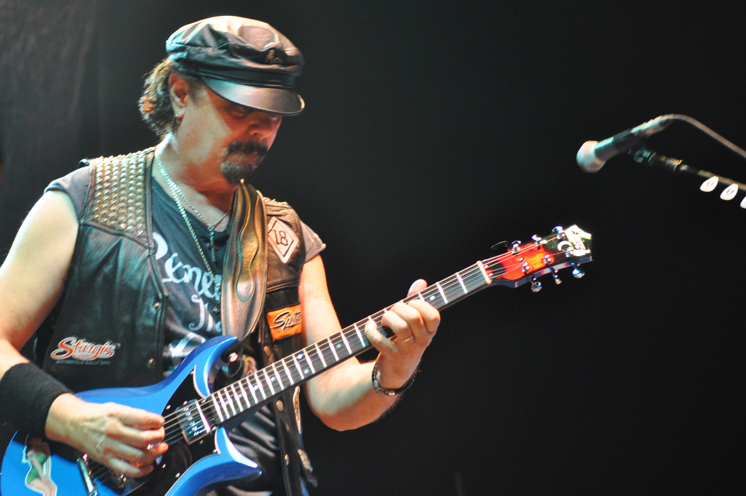 Steve Hunter à Rennes en 2011, avec Alice Cooper.